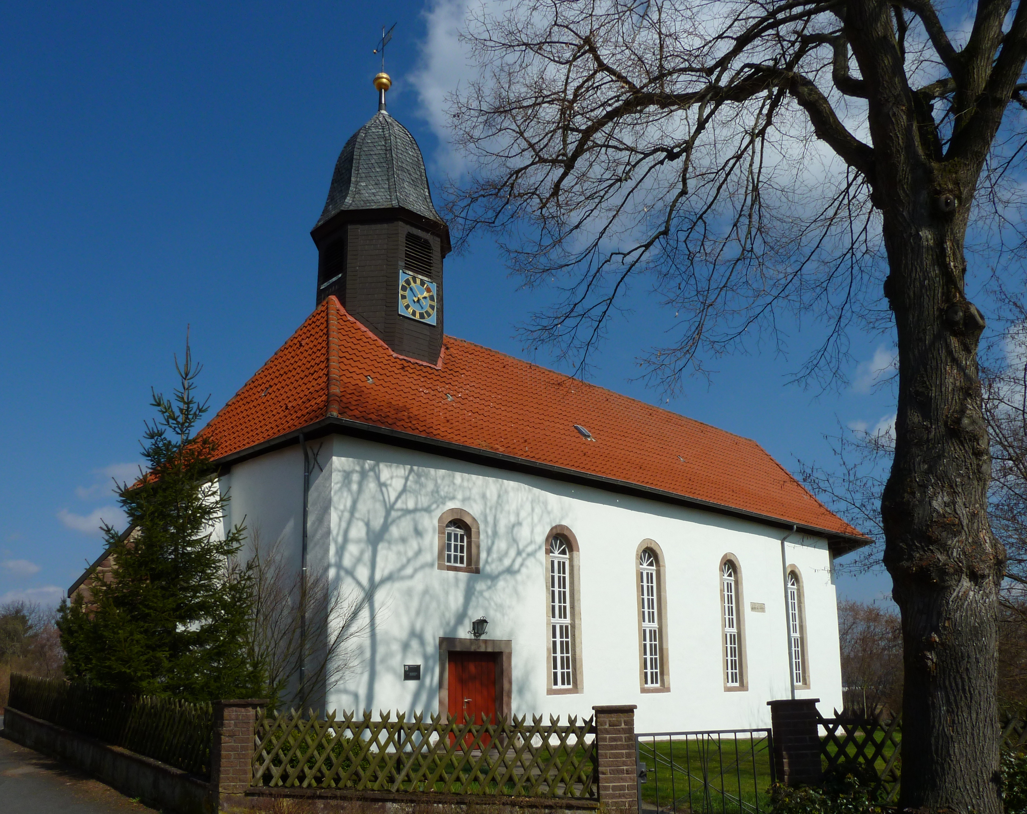 Ev.-luth. Kirche St. Petri in Hillerse, Stadt Northeim, Niedersachsen. Im Kern spätmittelalterlich, 1695 renoviert und erweitert, 1721 mit Dachreiter versehen.